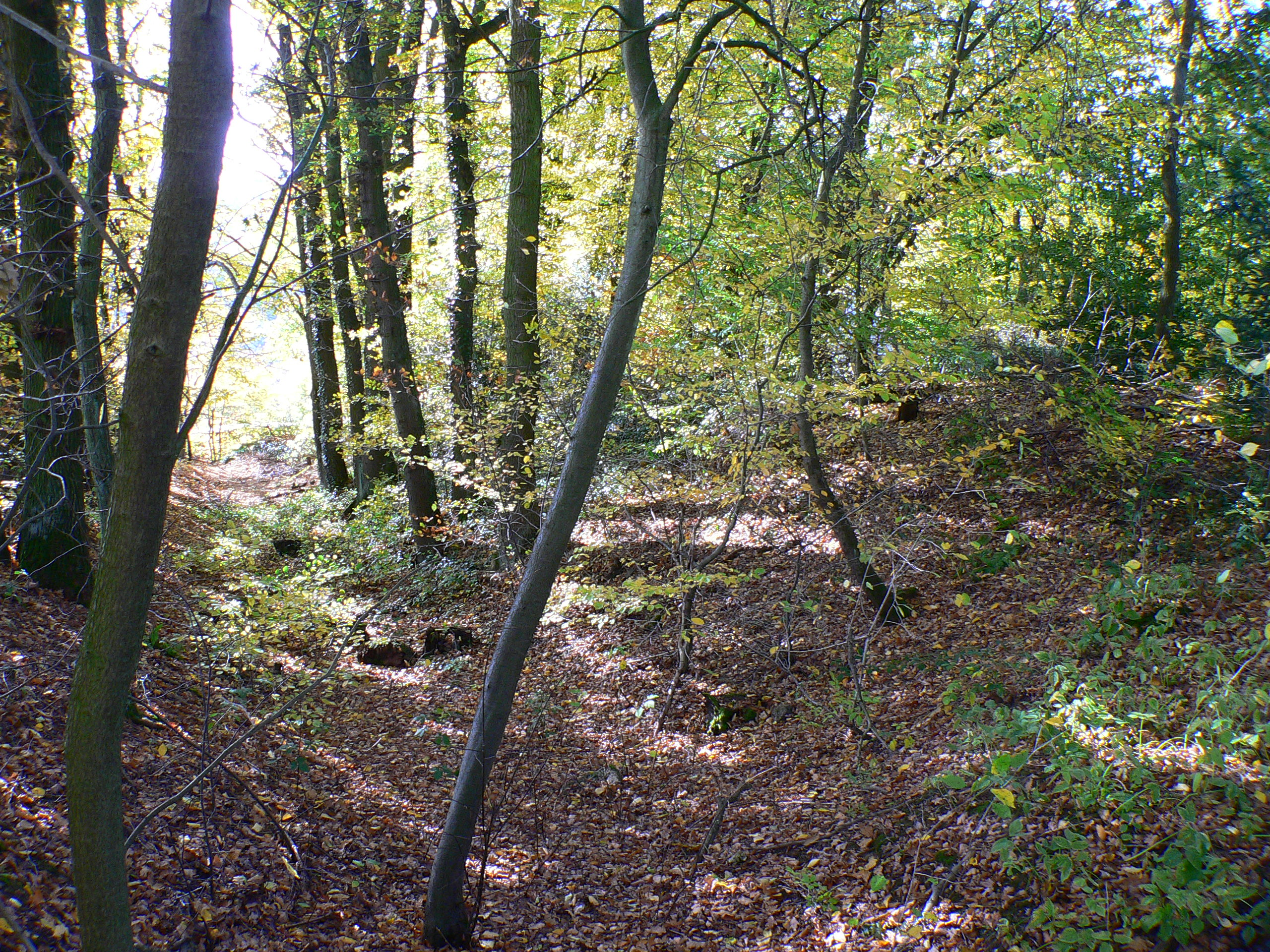 Burgstall in Fuldatal-Knickhagen (Wall und Graben) im Landkreis Kassel, Hessen, Deutschland